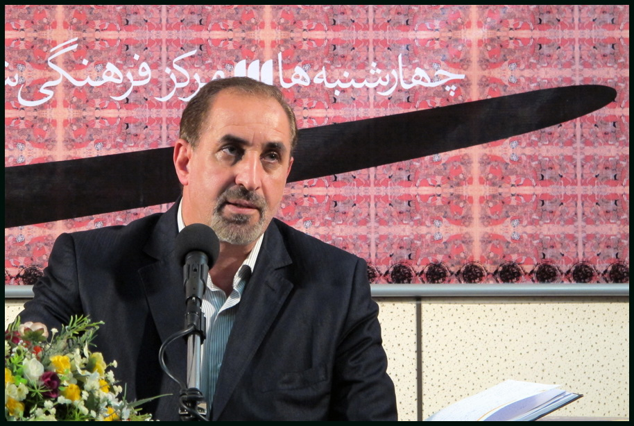 حسن بلخاری قهی